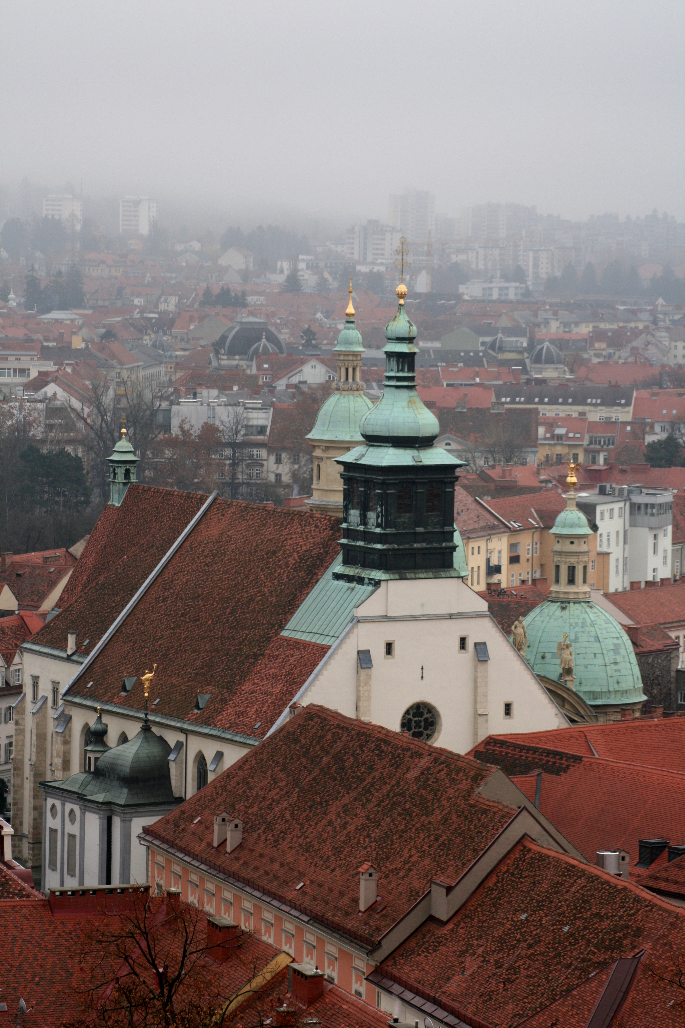 Dom und Mausoleum in Graz, Austria, vom Schlossberg gesehen (seen from Schlossberg)